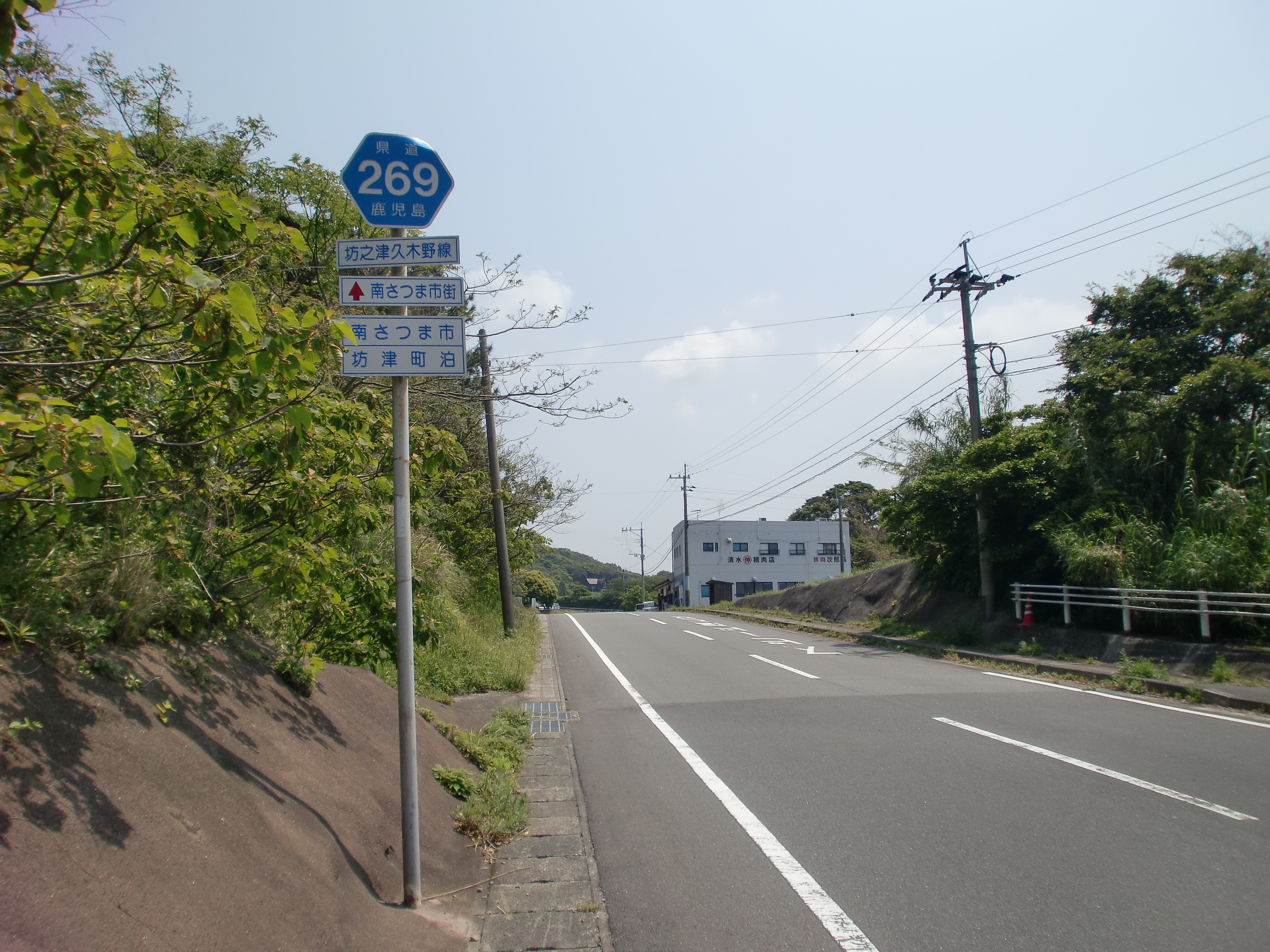 鹿児島県道269号坊之津久木野線を起点付近から久木野方面に望む。